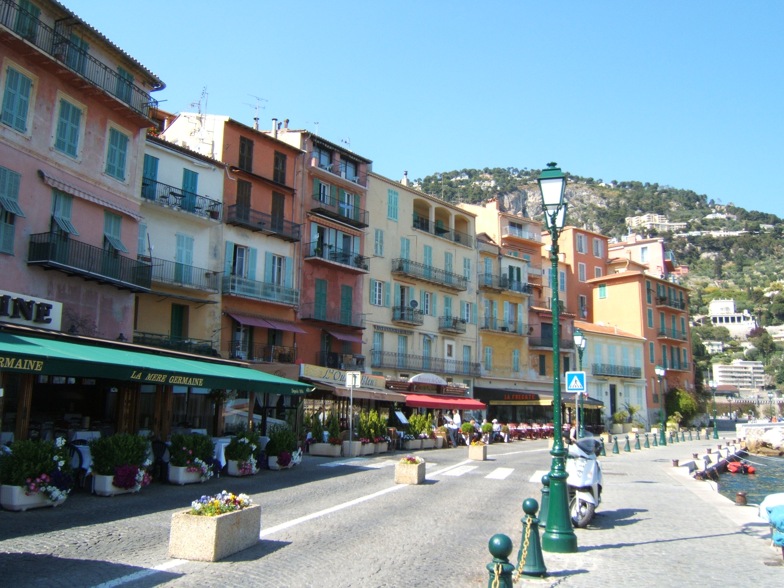 Le Quai de l'Amiral Courbet bordant le Port de la Santé à Villefranche-sur-Mer.